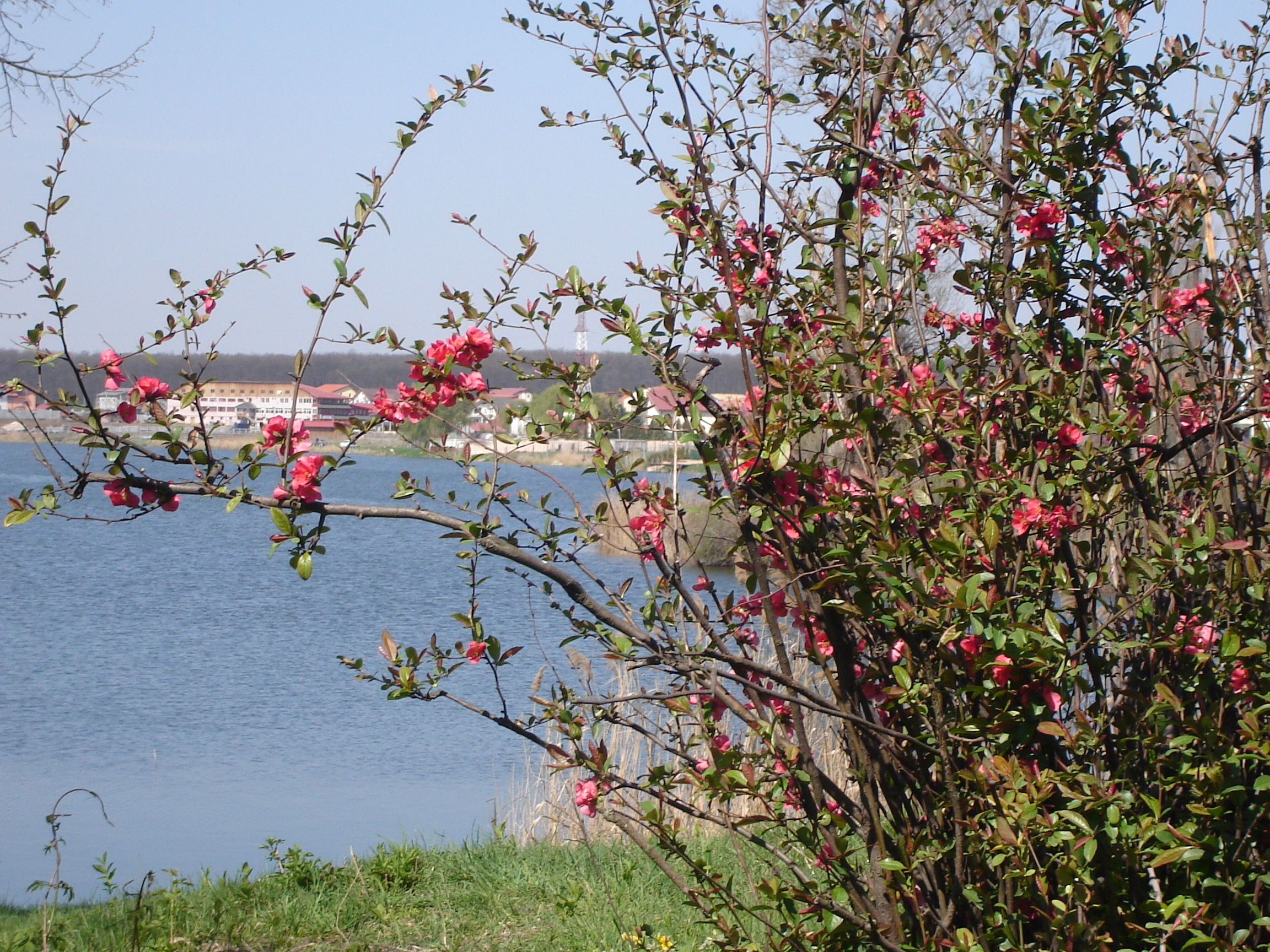 Parcul, lacul, grădină istorică, livadă (36,4 ha) 08